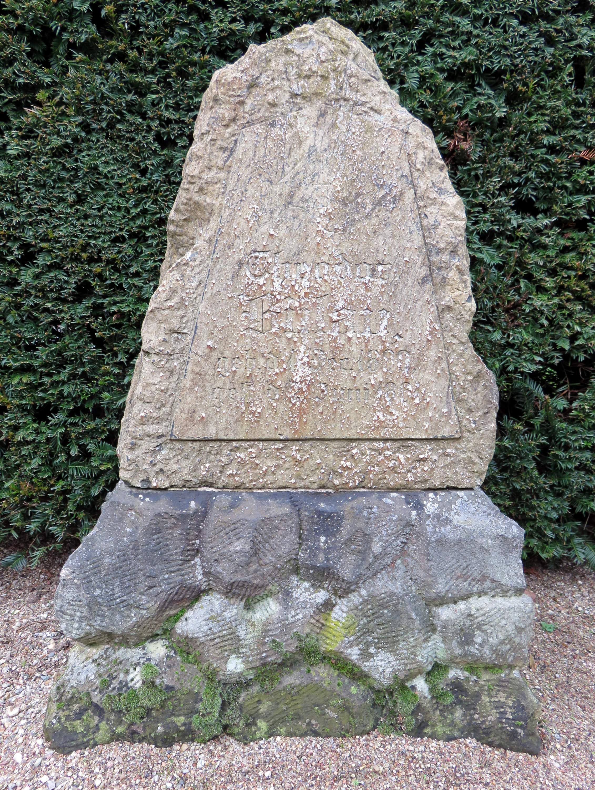 Grabmal für den Hamburger Architekten Theodor Bülau (1800–1861) im Grabmal-Freilichtmuseum Heckengarten auf dem Hamburger Friedhof Ohlsdorf, Inschrift bei .